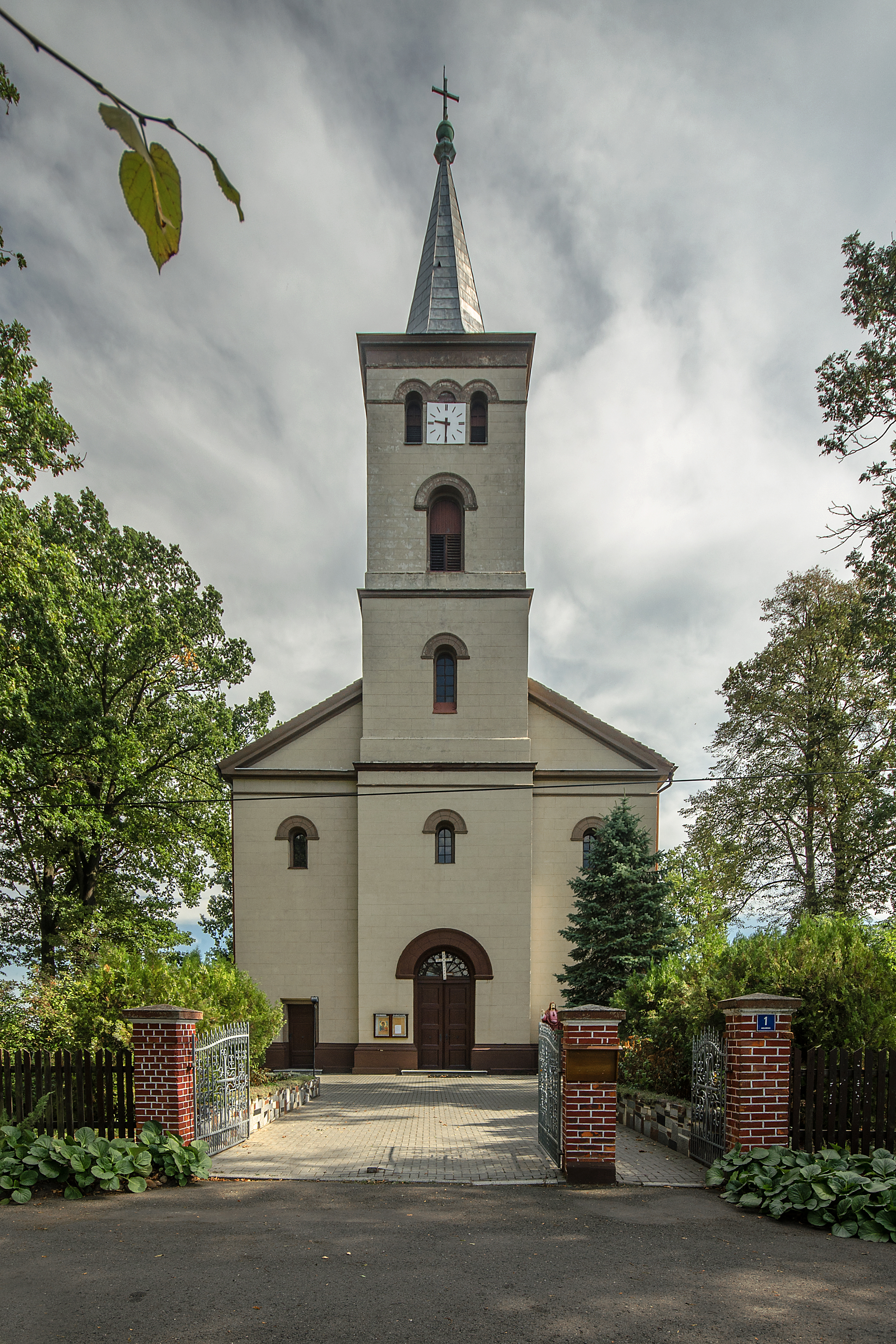 Biadacz, kościół ewangelicki, ob. rzym.-kat. fil. p.w. św. Józefa Robotnika, 1842-1843